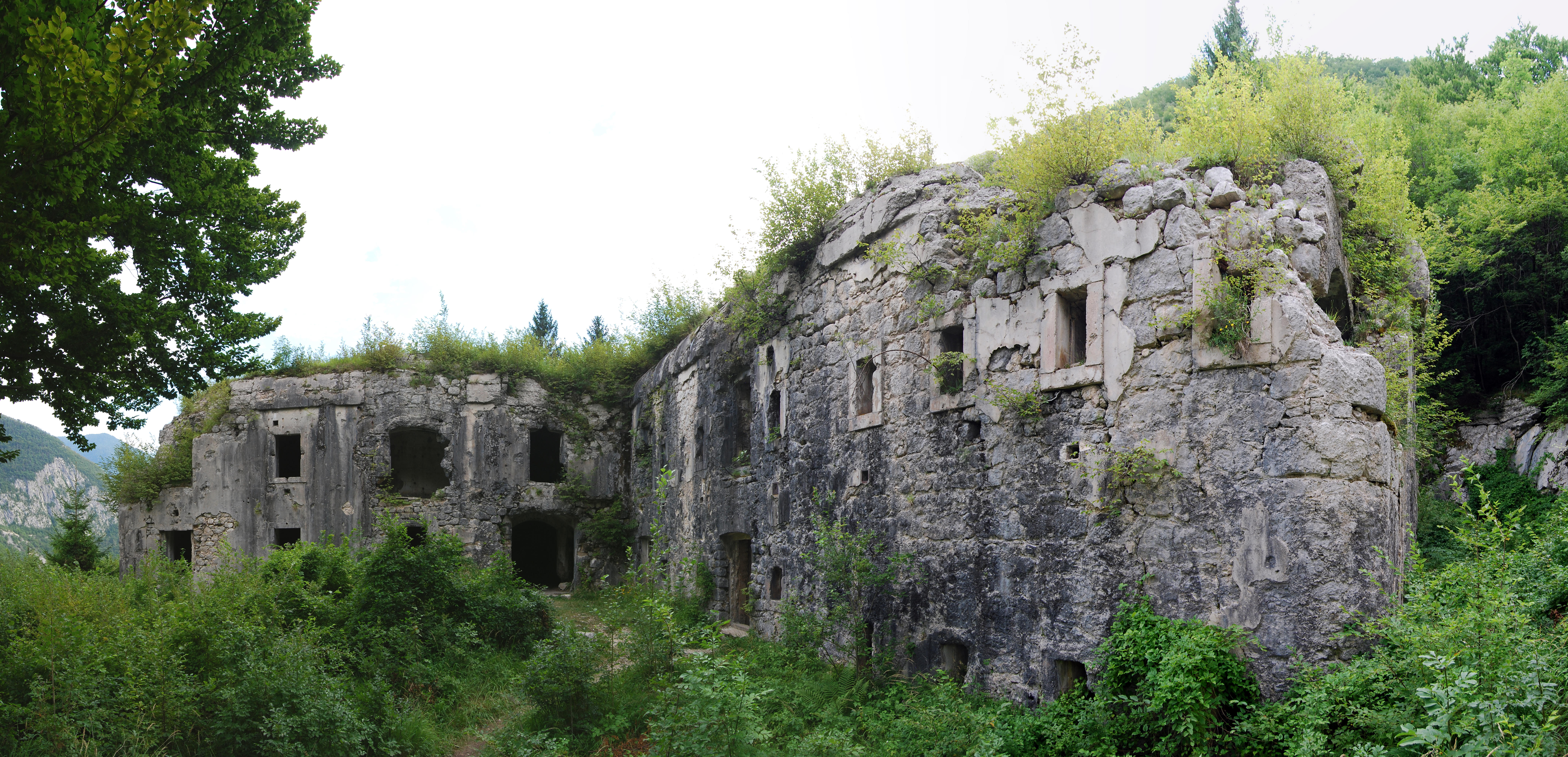 Panorama Hermanove utrdbe na Klužami.